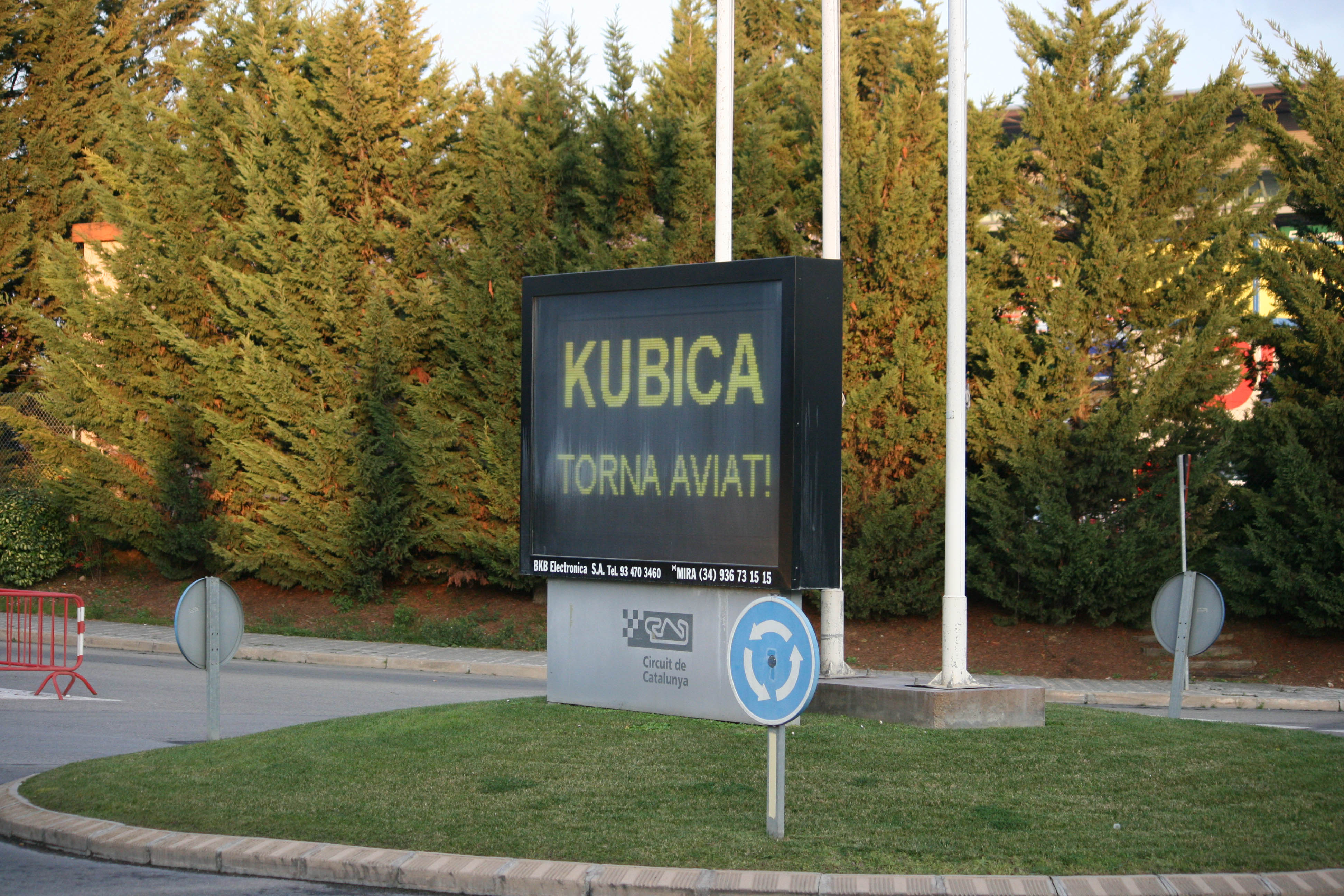 Kubica